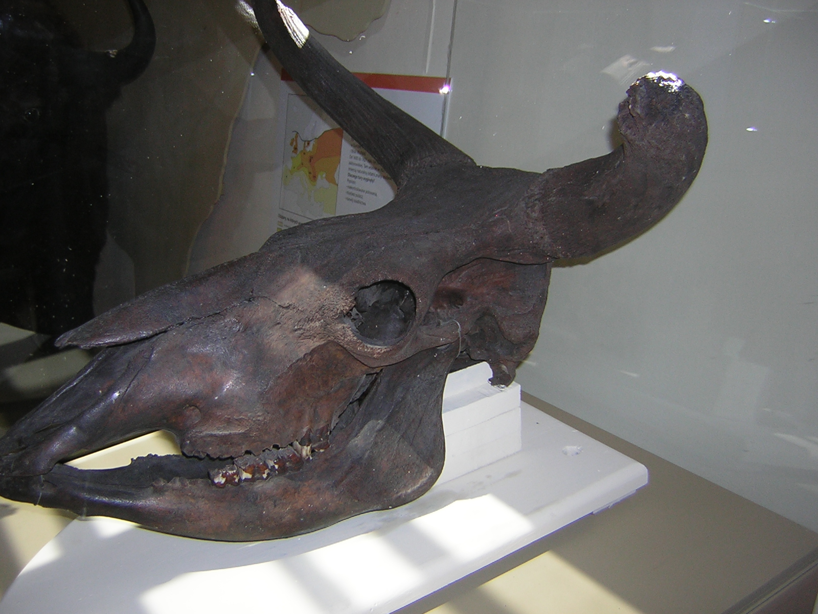 Czaszka Tura. (Bos primigenius Bojanus, 1827)